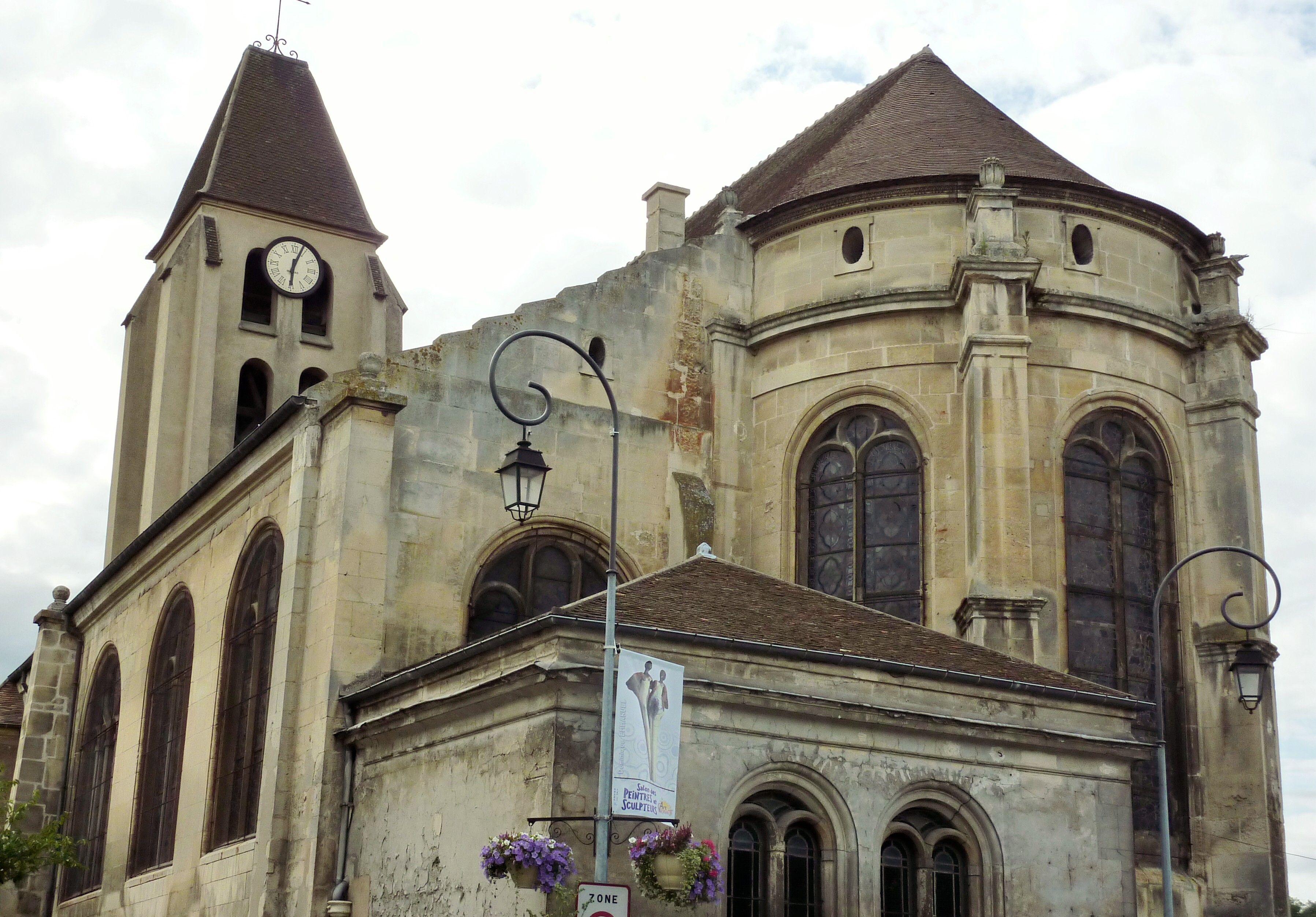 katholische Pfarrkirche Saint-Martin in Groslay